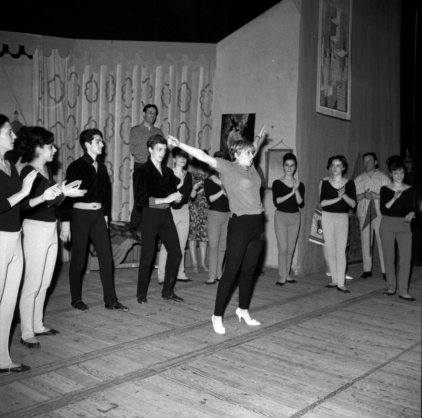 Théâtre du Capitole. Le 6 mai 1964. Vue d'ensemble des coullises sur scène du corps du ballet du Capitole entourant Annie Cordy, au centre, levant les bras pour montrer un mouvement de danse lors de la répétition de l'opérette "Visa pour l'amour".